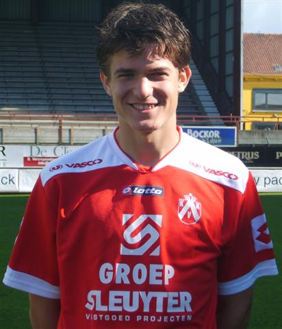 Foto van Tim Claerhout, zelf gemaakt door mij tijdens de fotosessie van KV Kortrijk.